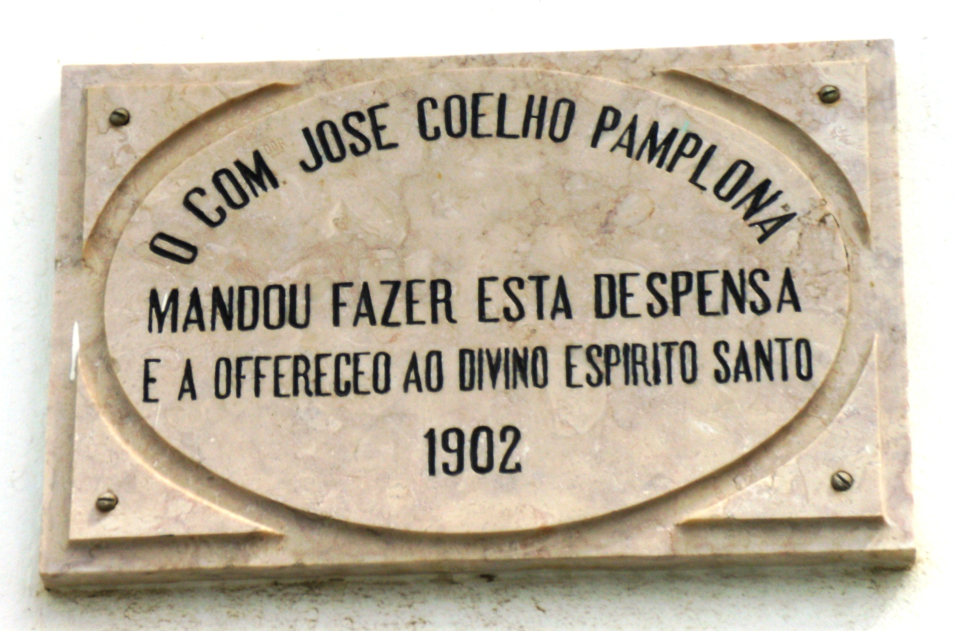 Império do Divino Espírito Santo no largo Comendador Pamplona, Cabo da Praia, Praia da Vitória, Ilha Terceira, Açores: inscrição epigráfica.